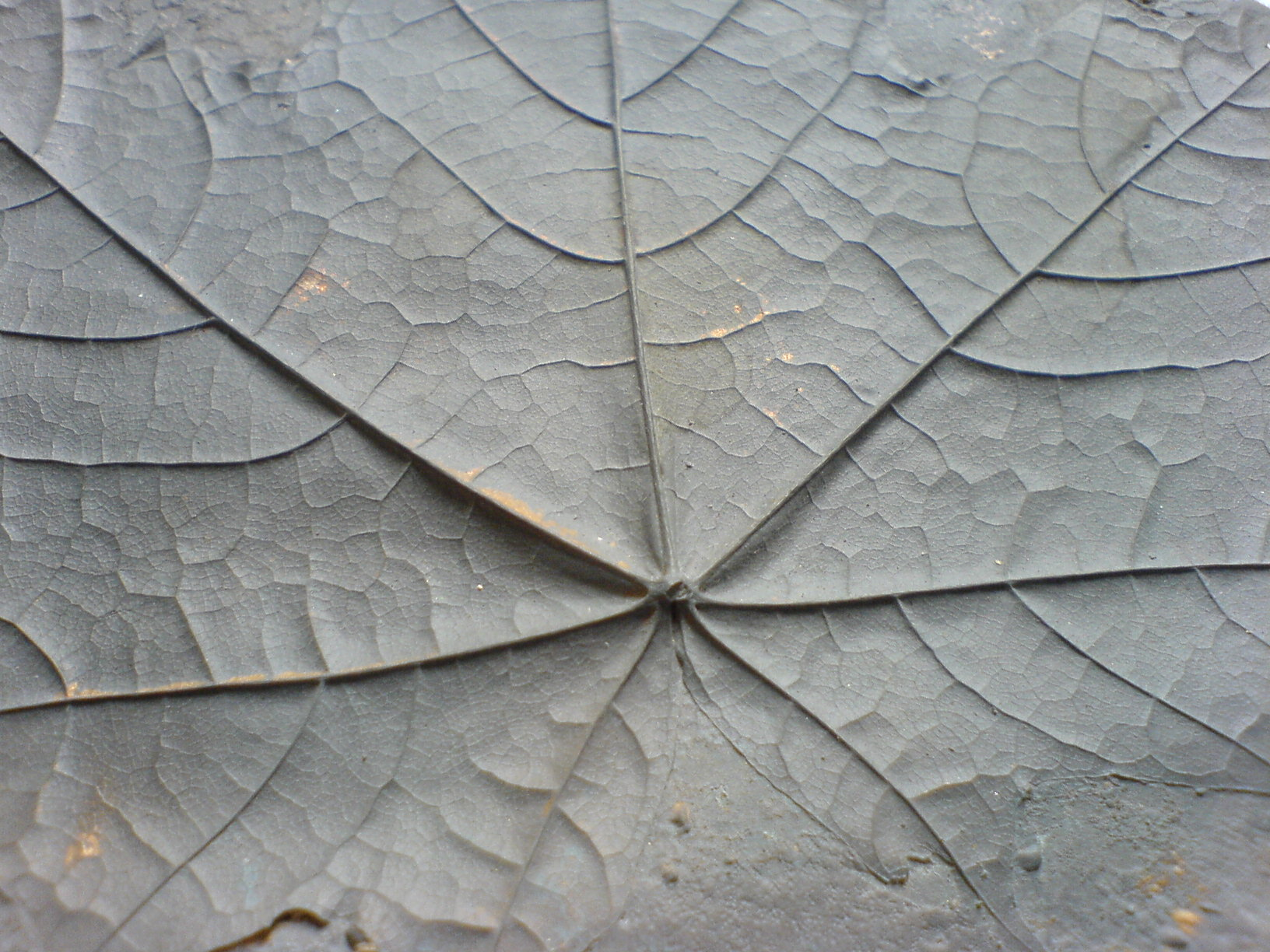 Ahornblatt Das Bild wurde von mir selbst aufgenommen. Es stellt ein Metallteil dar, das Eigentum der AWBTopTooling GmbH & Co.KG ( ist. Die Genehmigung zur Fotografie und Veröffentlichung wurde von der Geschäftsleitung erteilt. Das Bild darf (Quellenangabe erwünscht) in jeder Form und Art weiterverwendet werden.